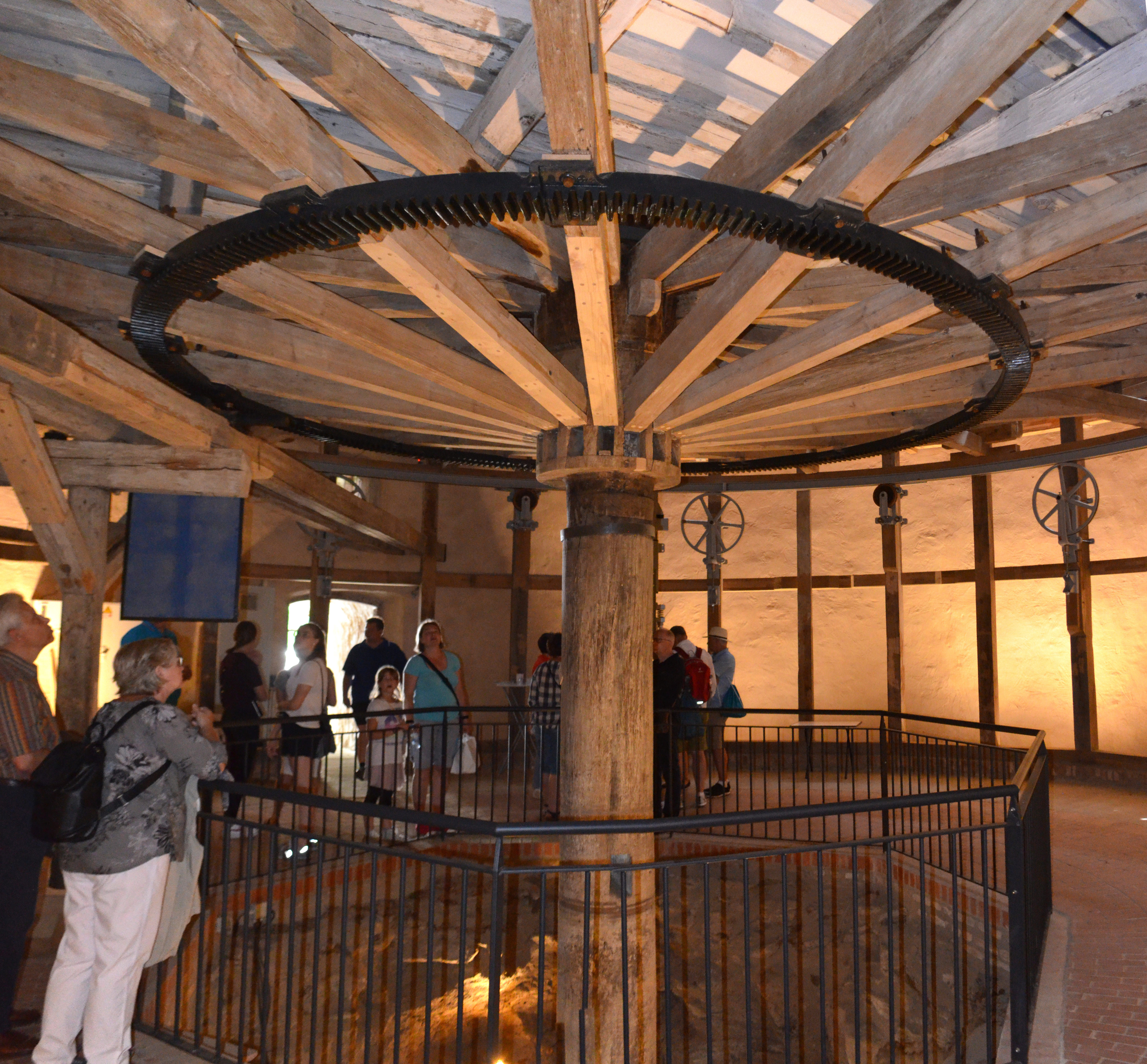 Hanau, Karussell Wilhelmsbad, Technikgewölbe